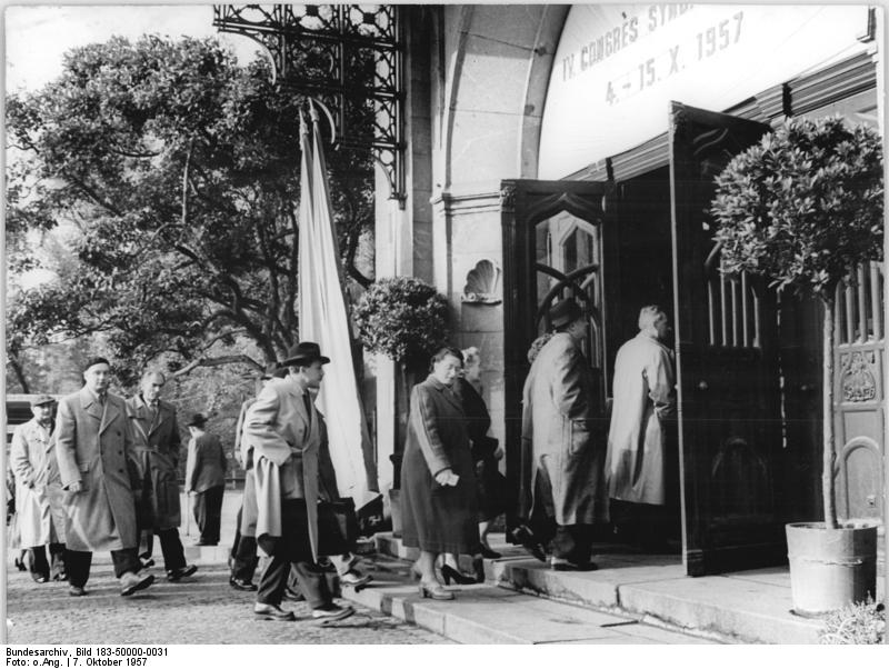 Leipzig, Zoo, Kongresshalle, Eingang Zentralbild Me 7.10.1957. IV. Weltgewerkschaftskongreß vom 4.-15.10.1957 in Leipzig. UBz: Die Delegierten bei ihrem Eintreffen in der Leipziger Kongreßhalle.